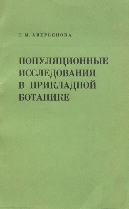 Монография Т.М. Аверьяновой